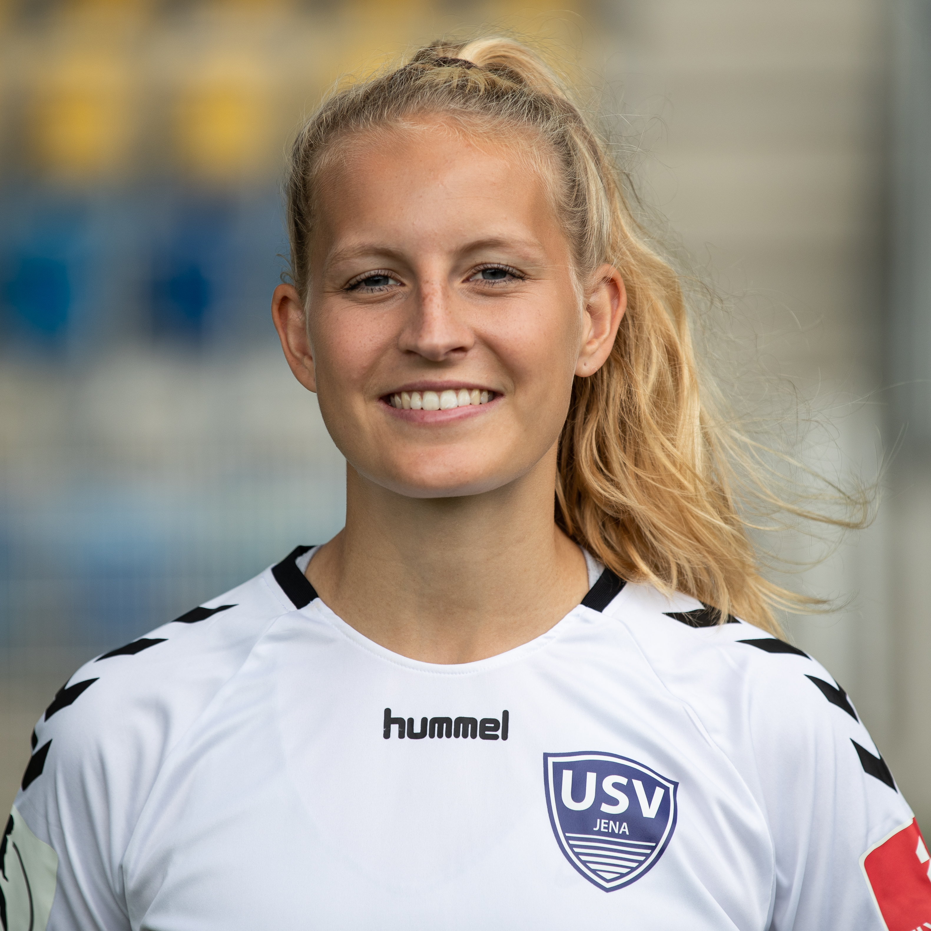 Fußball, Flyeralarm Frauen-Bundesliga, Mannschaftsfotos FF USV Jena; Maren Marie Tellenbröker (FF USV Jena, 23); Porträt, Einzelbild